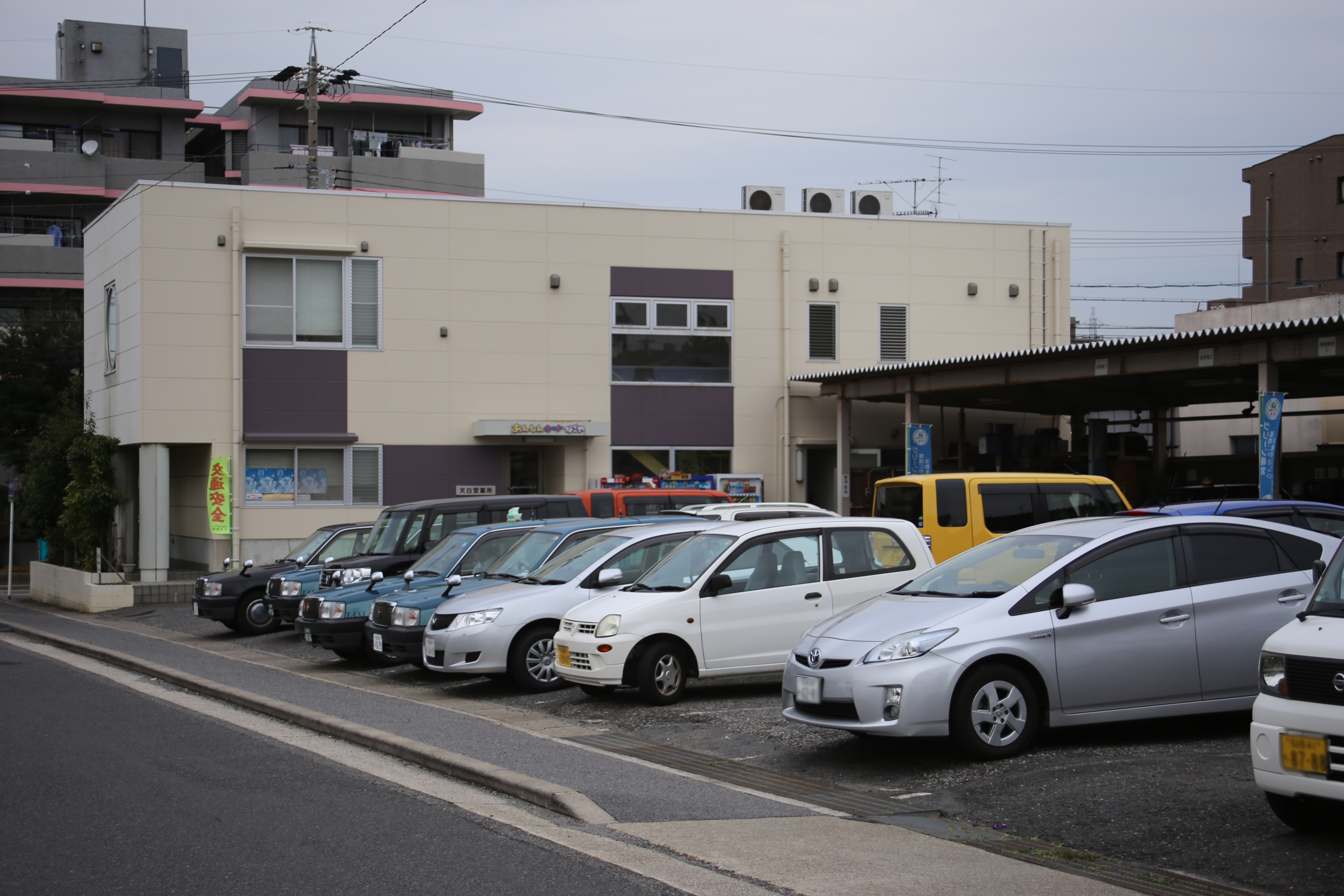 名古屋市天白区原四丁目のあんしんネットなごや天白営業所を西側公道南側より撮影。ただし、ナンバープレートにつき画像処理済。